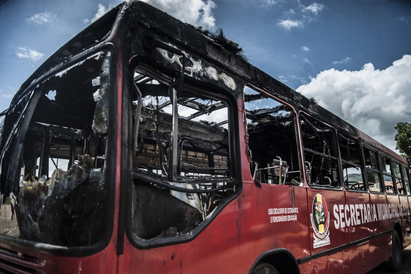 Ilhota (SC) - Três ônibus utilizados para transporte de estudantes foram incendiados na madrugada desta terça-feira (5) no pátio da prefeitura da cidade.